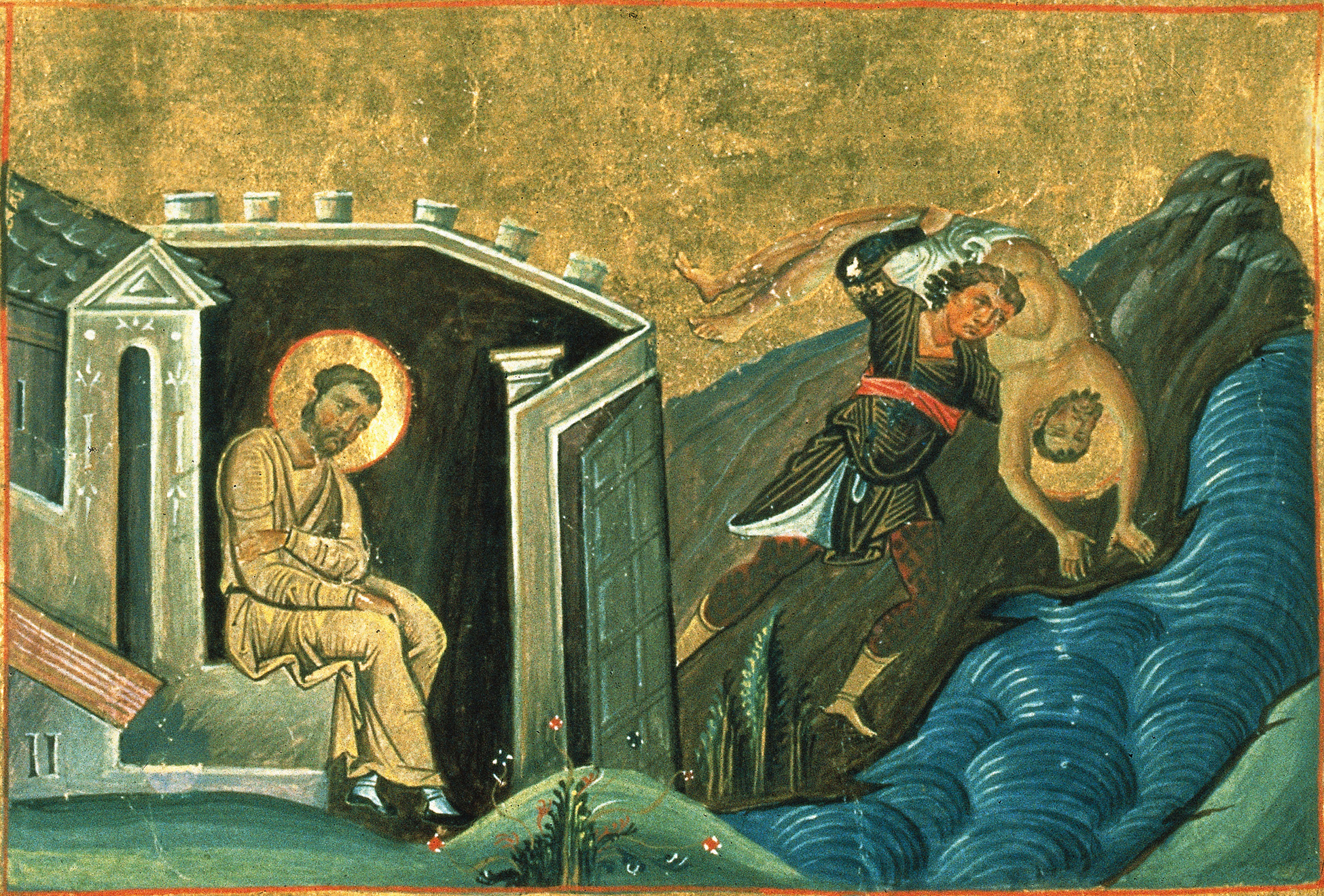 Лукиан Антиохийский, пресвитер, сщмч. Миниатюра Минология Василия II. Константинополь. 985 г. Ватиканская библиотека. Рим.